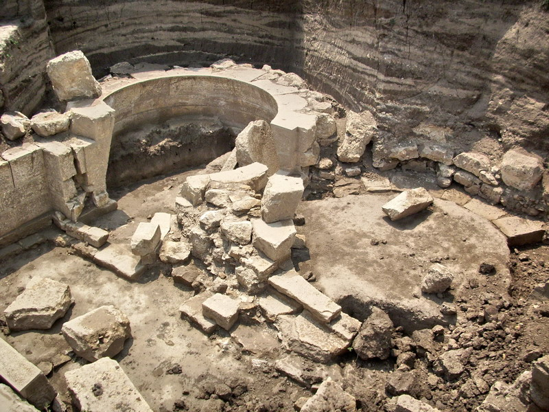 Руините на подмогилните съоръжения при село Гагово, община Попово